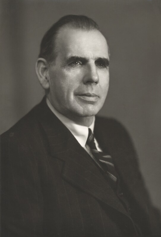 Lord Macdonald